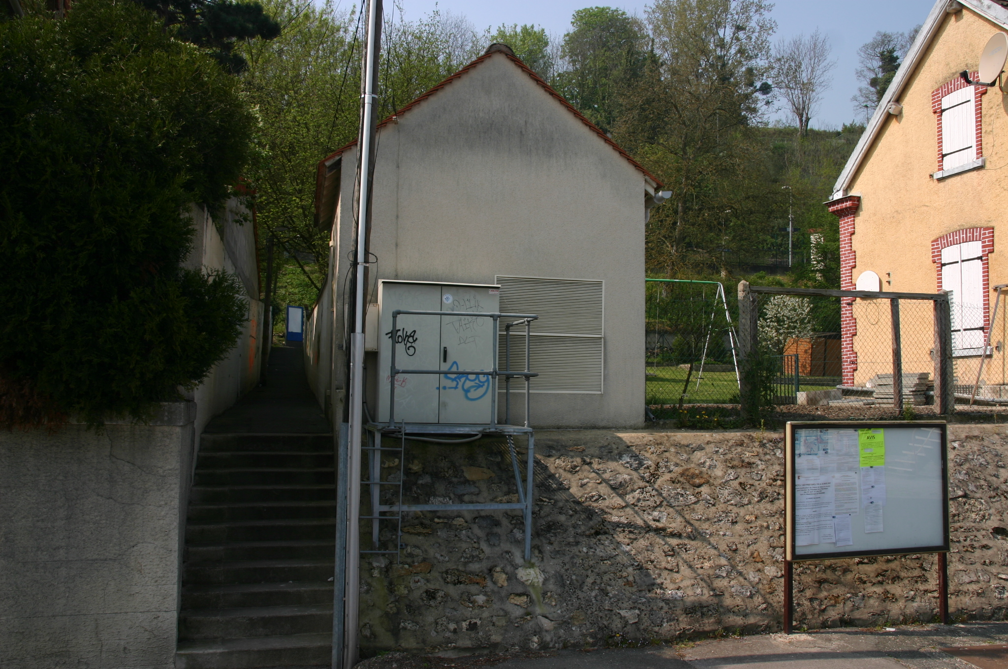 La gare du Plessis-Chenêt, Coudray-Montceaux, département de l'Essonne (France)